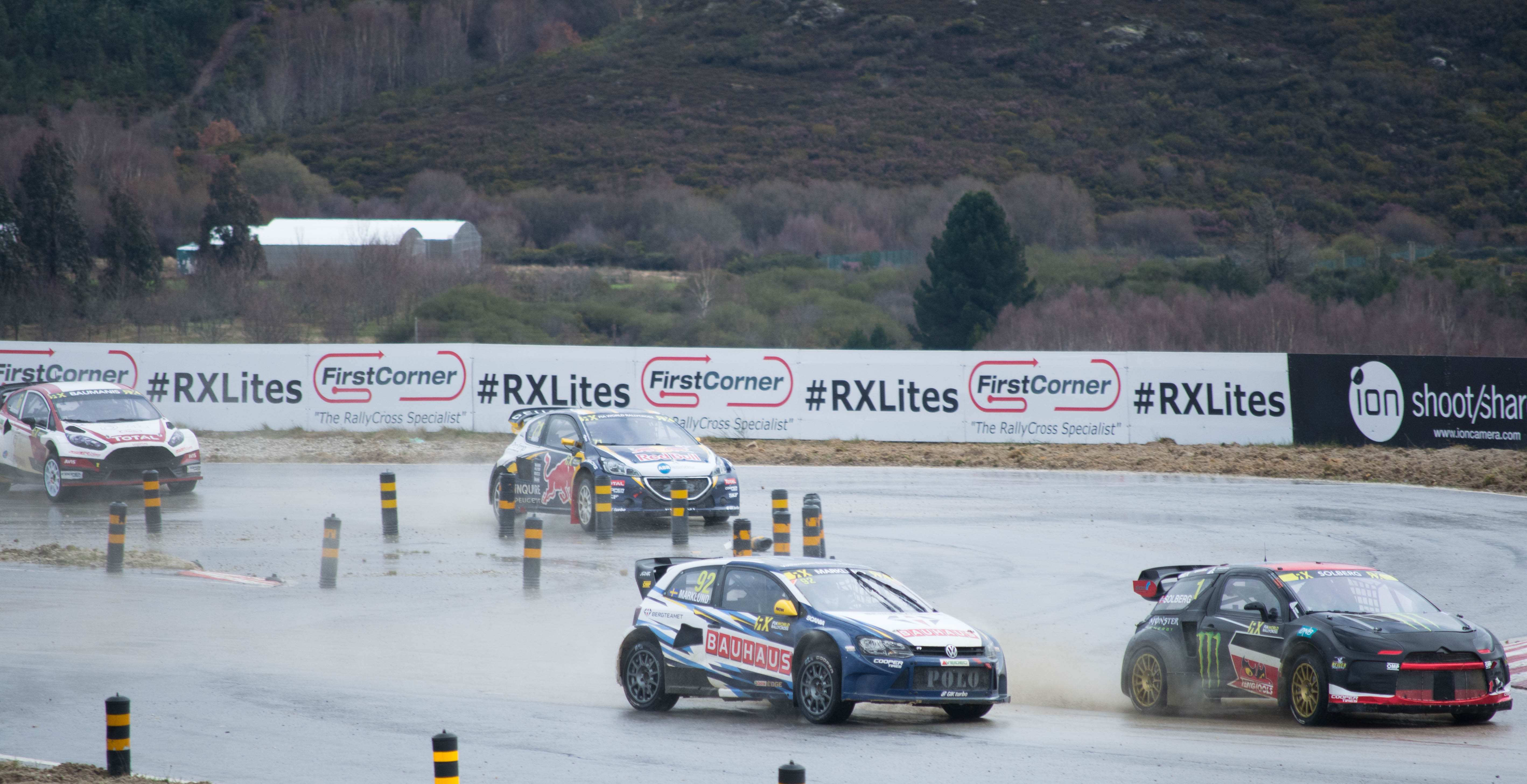 Q2 Montalegre